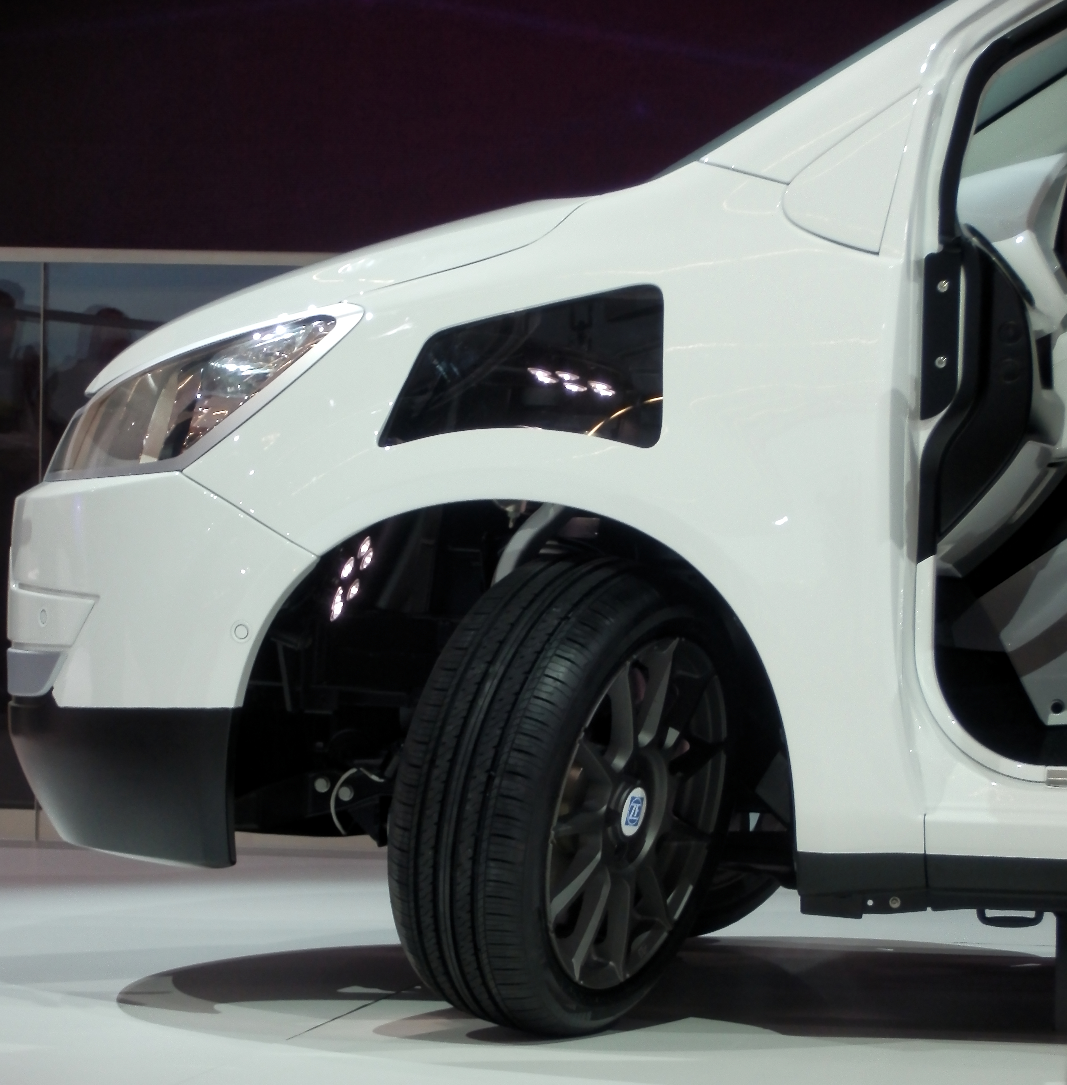 ZF Advanced Urban Vehicle at IAA 2015